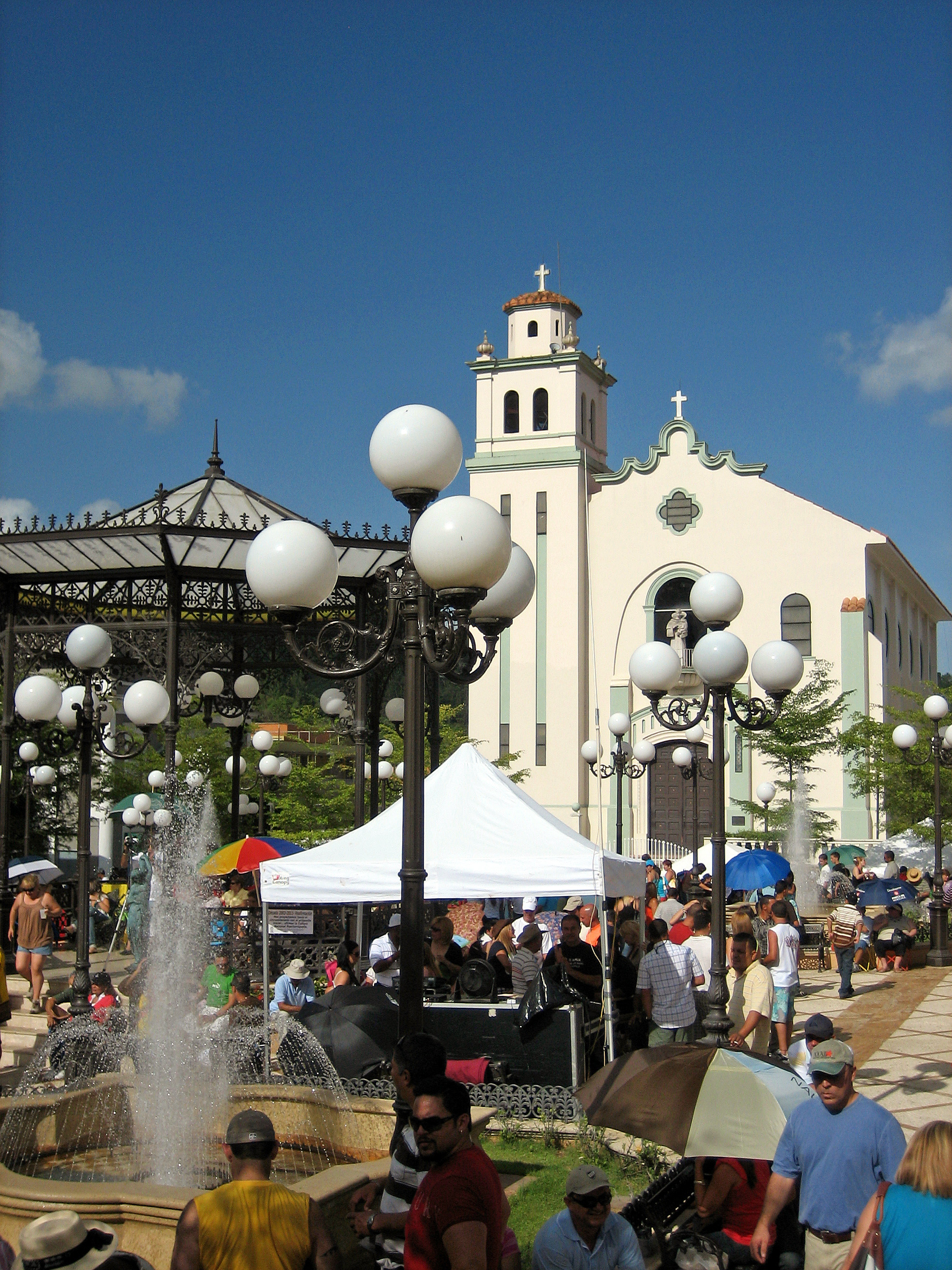 Feria Nacional de Artesania 2008, Plaza Bicentenaria Monseñor Miguel A.Mendoza, Barranquitas, Puerto Rico